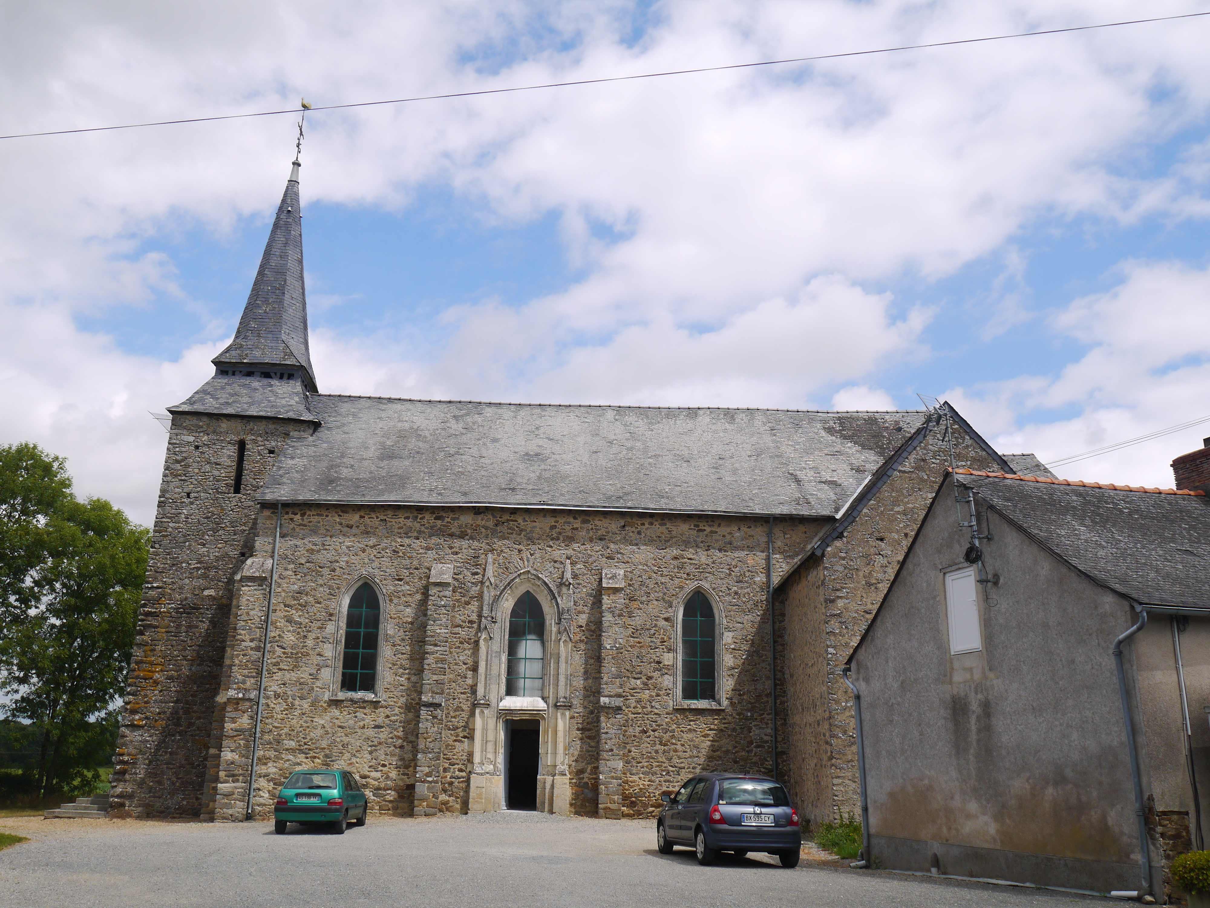 Saint-Charles-la-Forêt église